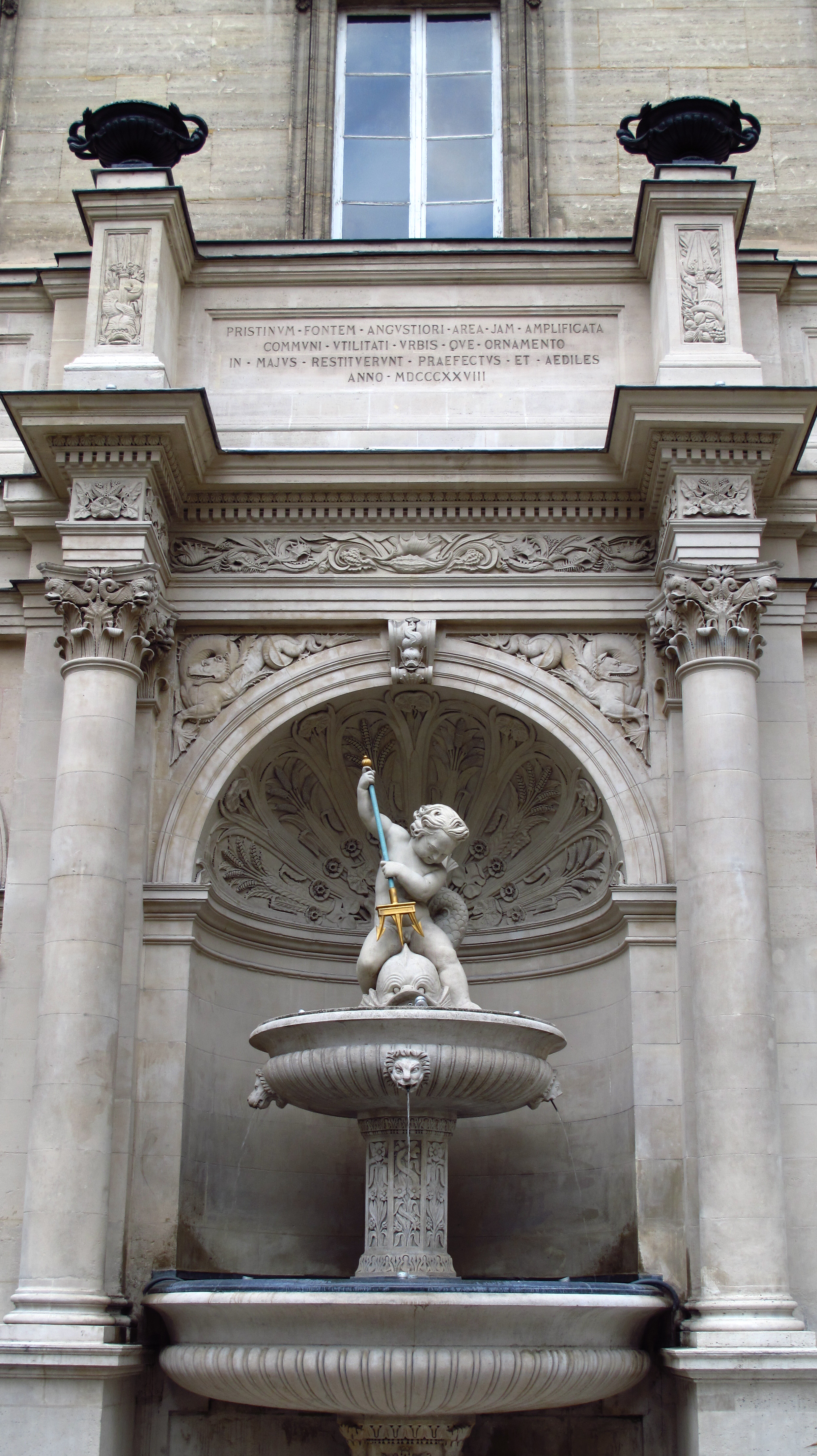 Fontaine Gaillon, place Gaillon (Paris, 2e arrondissement). Créée en 1707, par Jean Beaussire, architecte de Louis XIV, et reconstruite par Louis Visconti en 1827. Restaurée en 1971 par Oberdoerffer. Texte du fronton, datant de la reconstruction : Pristinum Fontem Angustiori Area Jam Amplificata Communi Utilitati Urbis Que Ornamento In Majus Restituerunt Praefectus Et Aediles Anno MDCCCXXVIII.